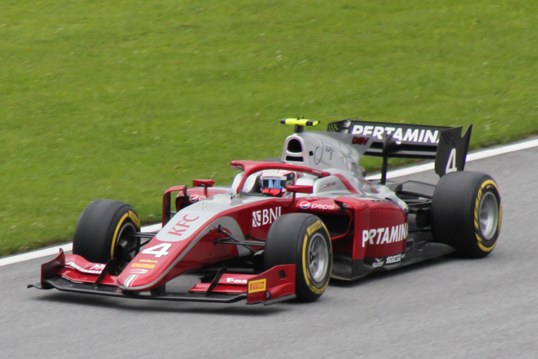 04 Nyck de Vries beim Rennwochenende in Österreich 2018 (1)